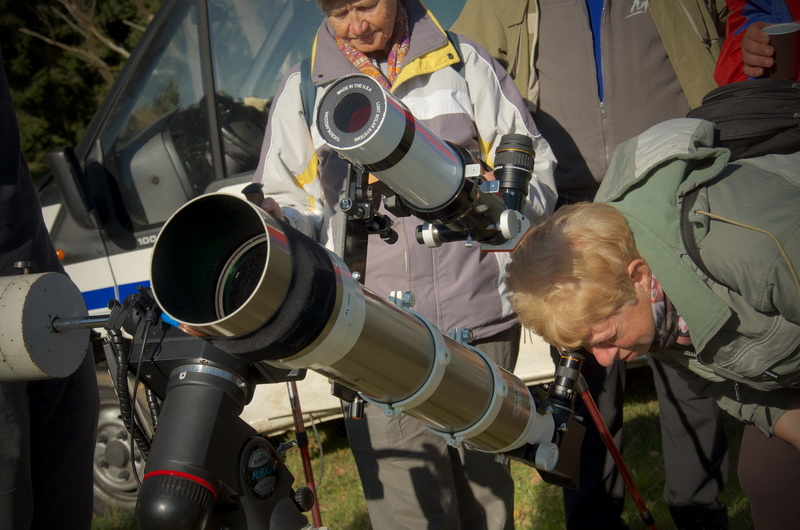 Pozorování sluneční fotosféry v zaniklé osadě Umíř při akci Den živých vod.